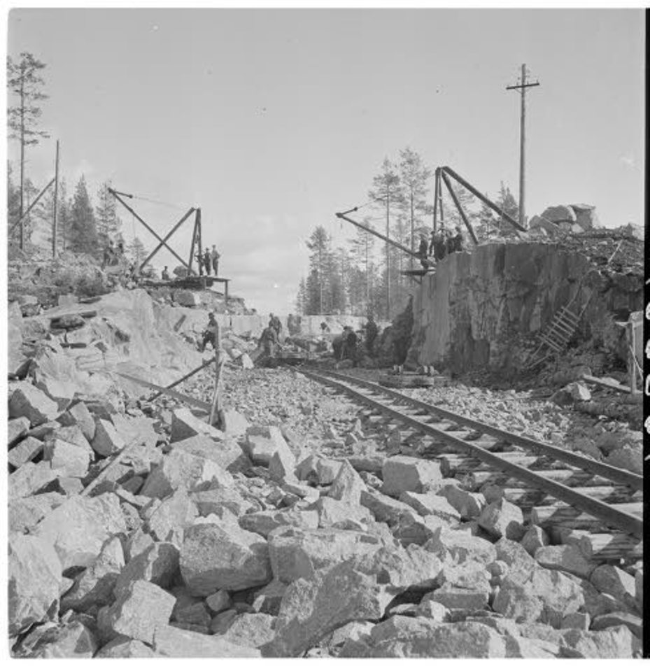 Мегрега